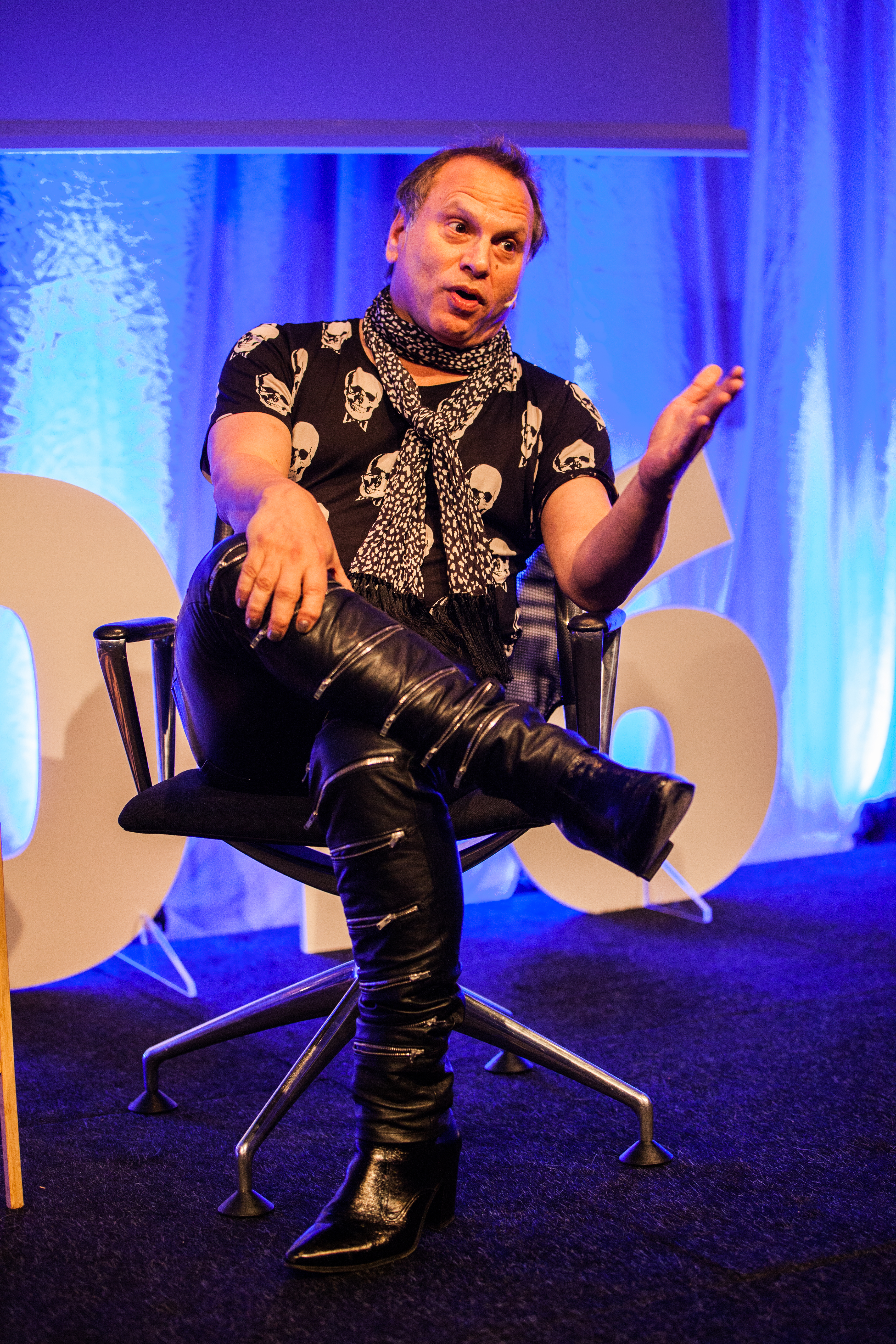 Medvirkende: Buzz Bissinger.Moderator: Asbjørn Slettemark.